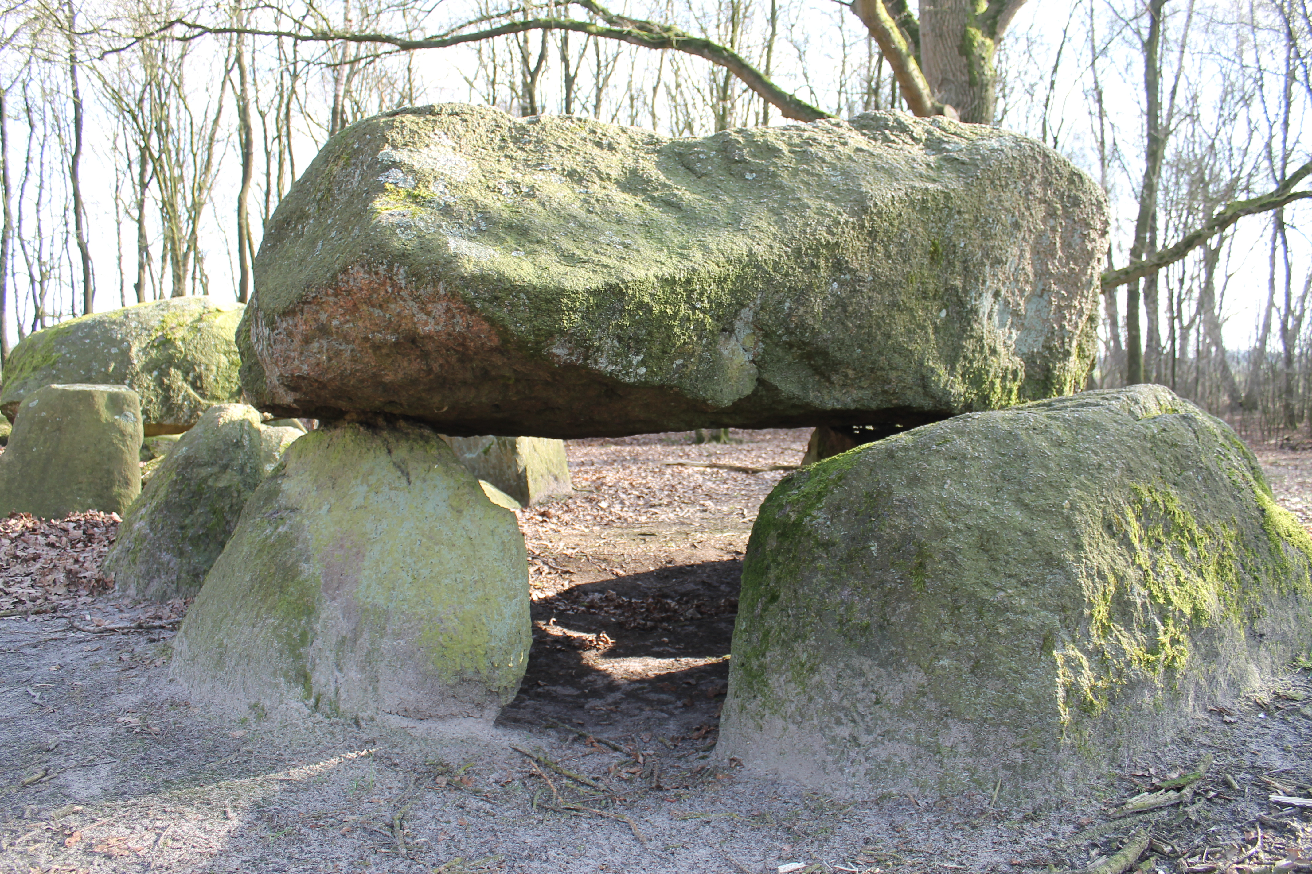 Das Gelände des Wappengrabs in Groß Berßen